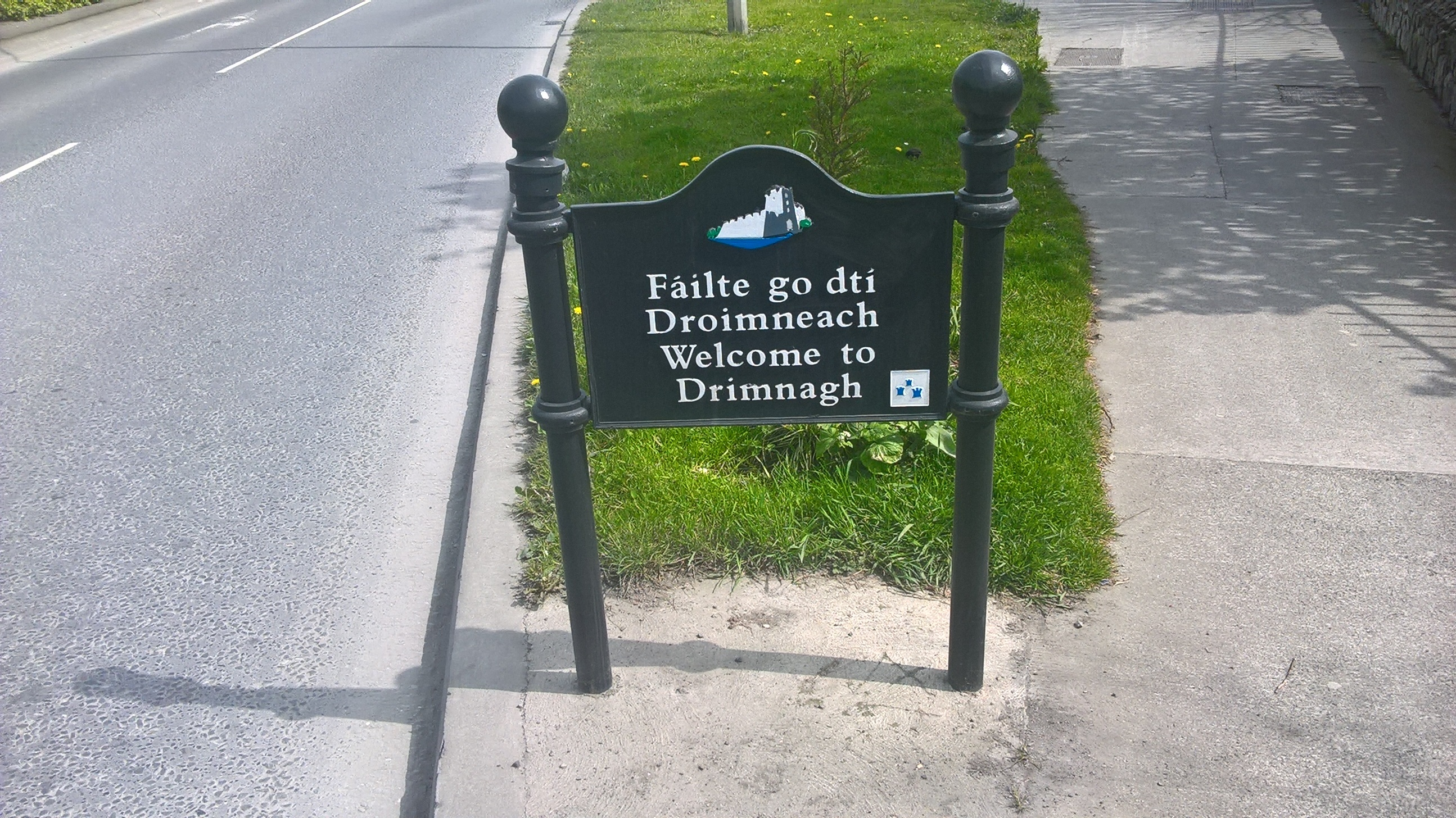 Comhartha fáilte go Droimneanach.